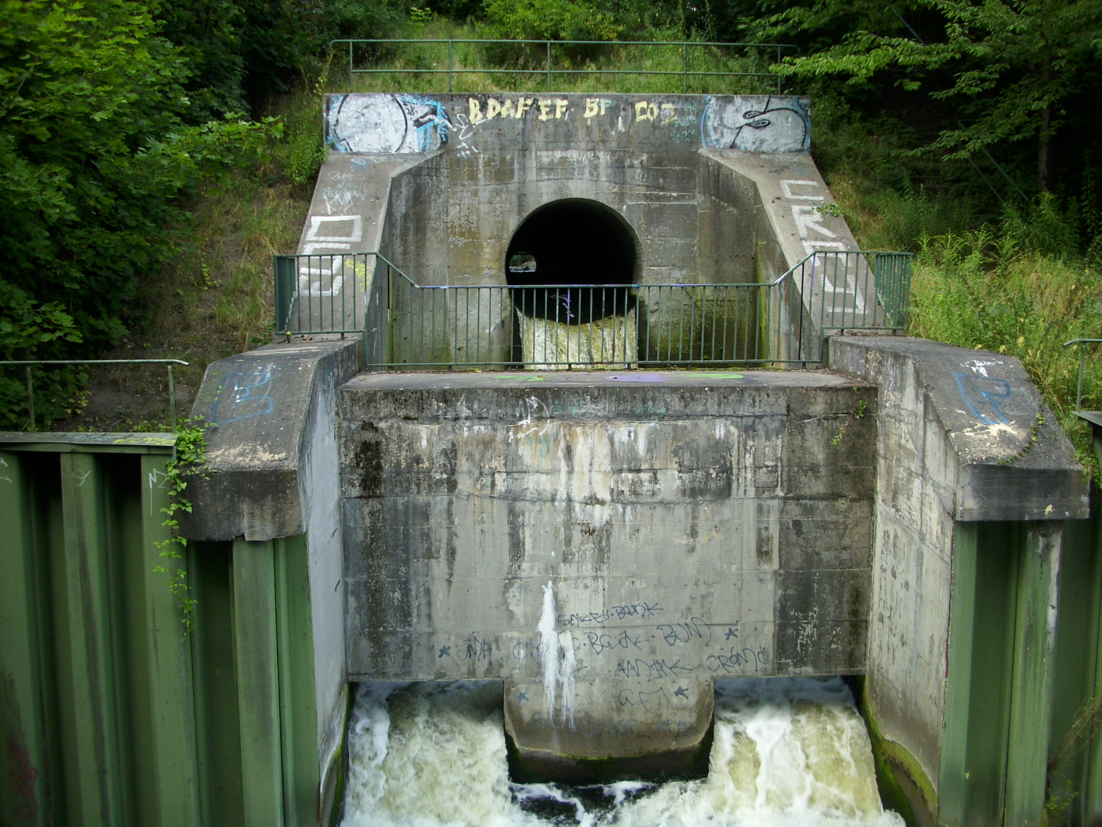 Einleitung des Klärwerksableiters Schönerlinde in den Nordgraben